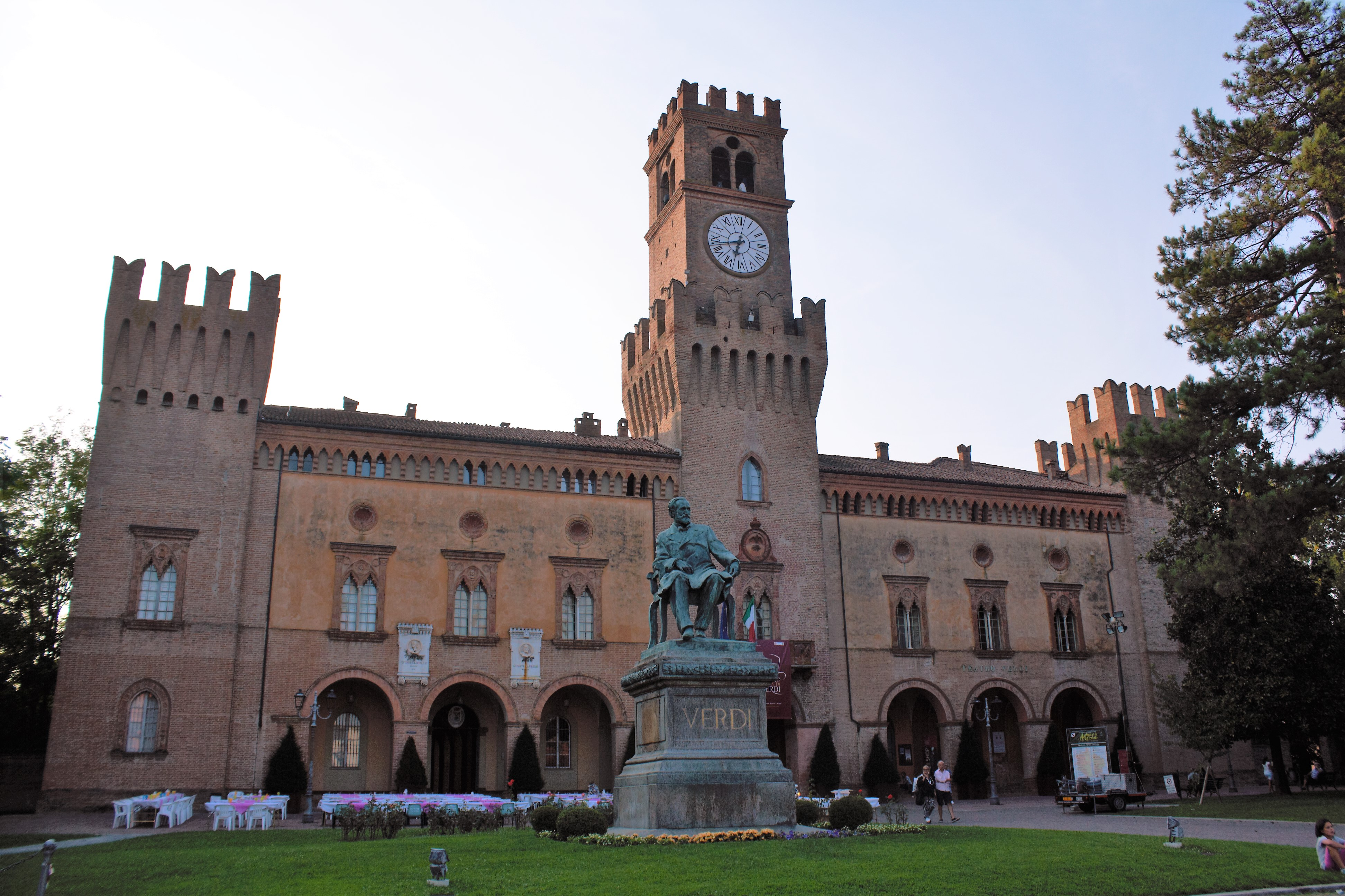 piazza verdi e alle spalle il teatro verdi